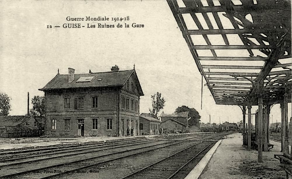 La gare de Guise après la guerre 14/18.